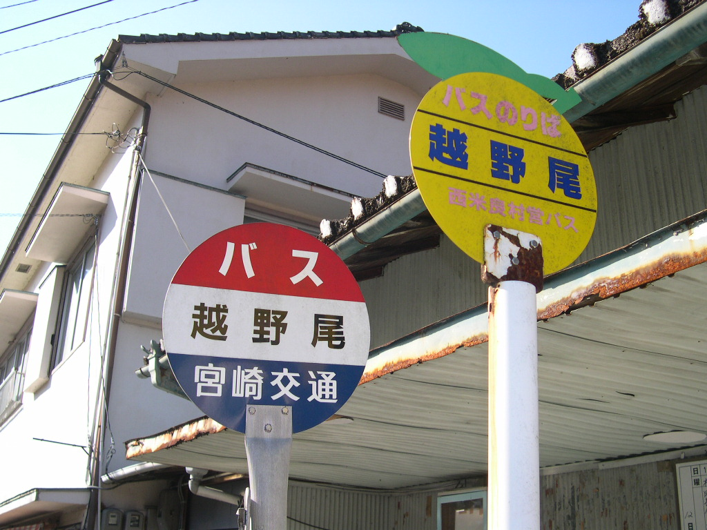 2005-12-19撮影